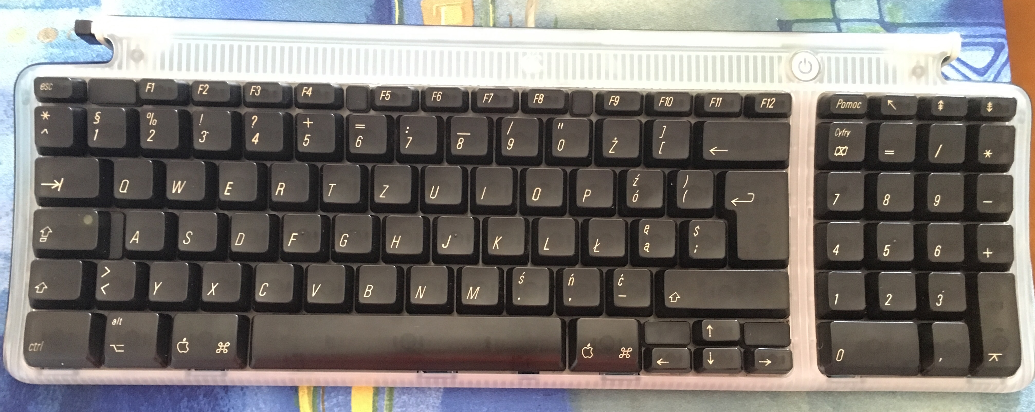 Zdjęcie klawiatury Apple USB Keyboard od iMaca G3